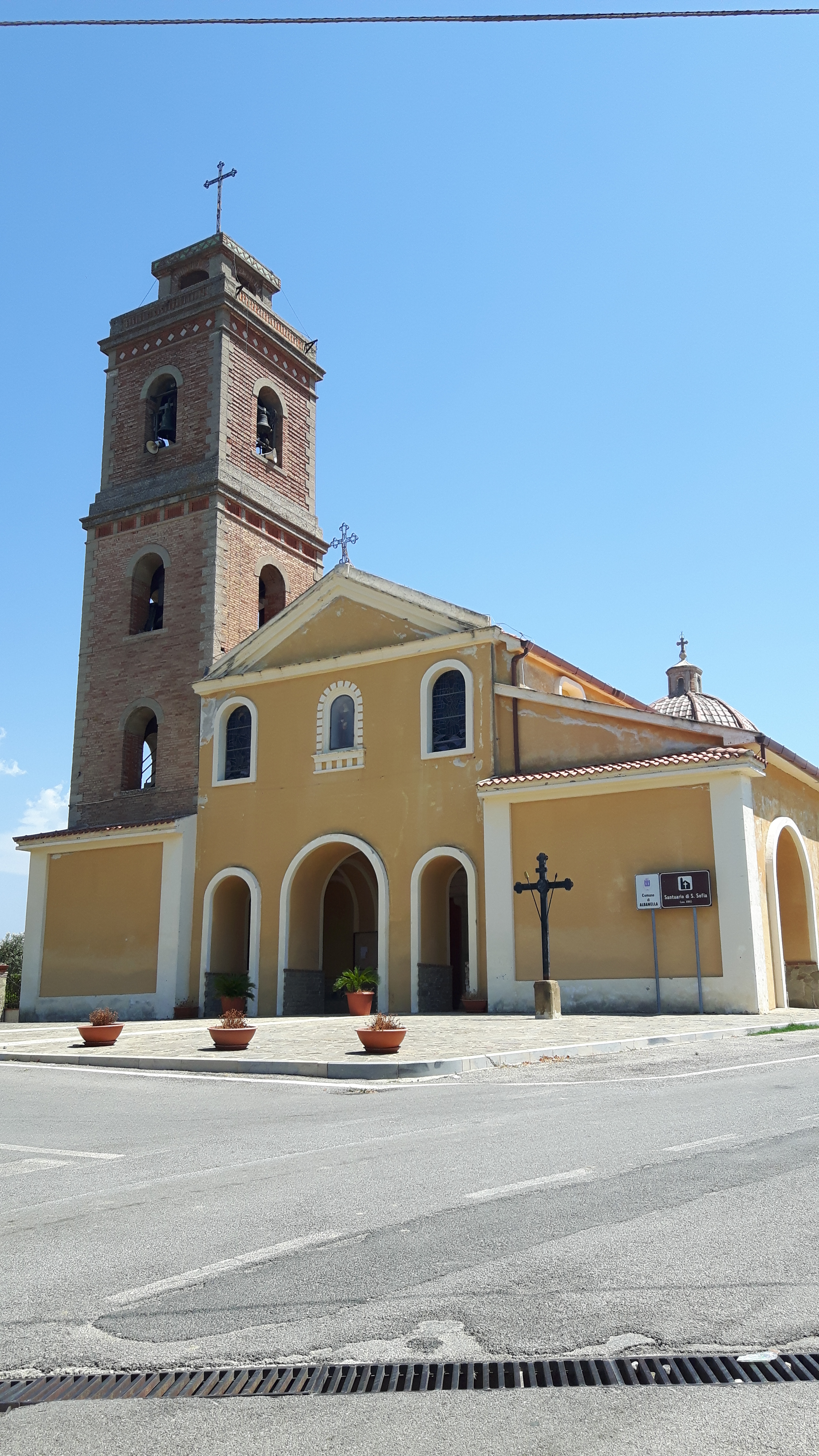 La facciata principale del Santuario di Santa Sofia in Albanella.